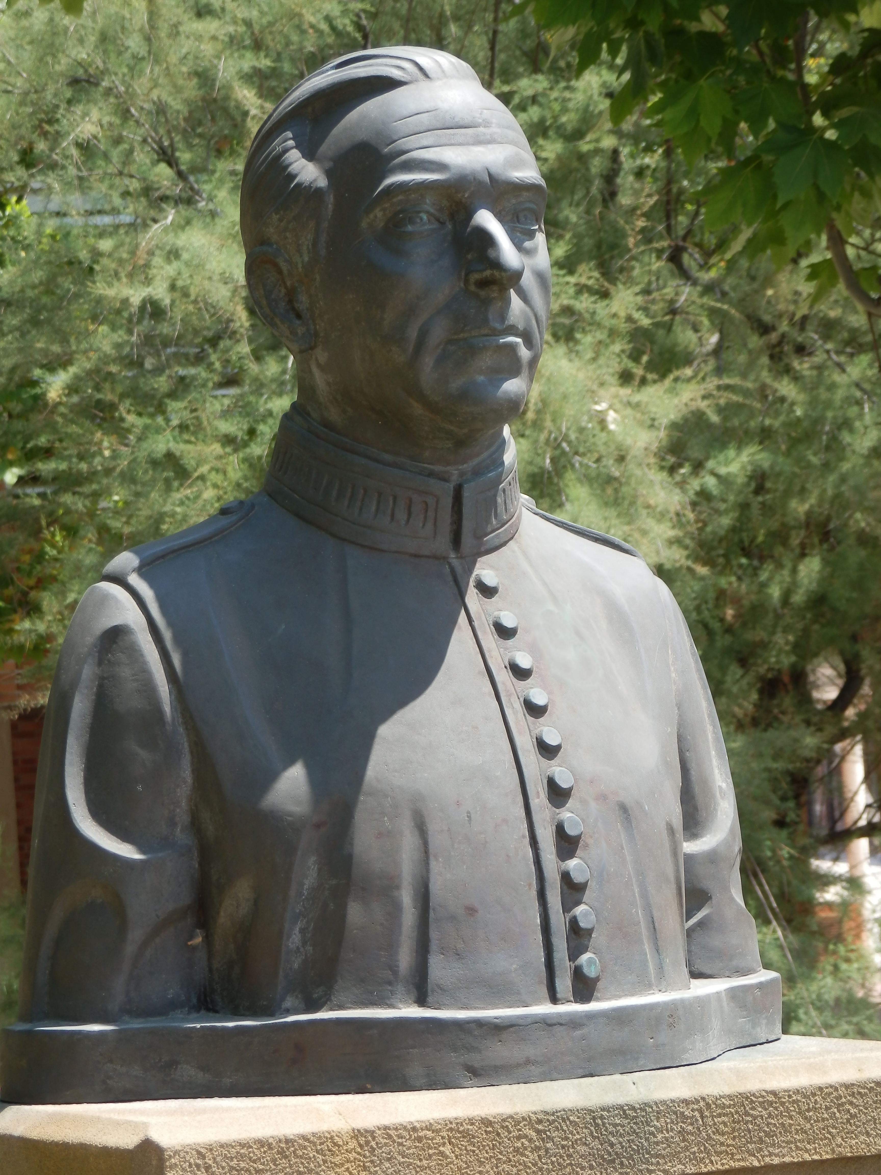 Monumento a Ángel Sanz Briz en la plaza Ángel Sanz Briz de Zaragoza, España.